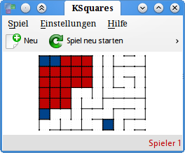 KDE game KSquares